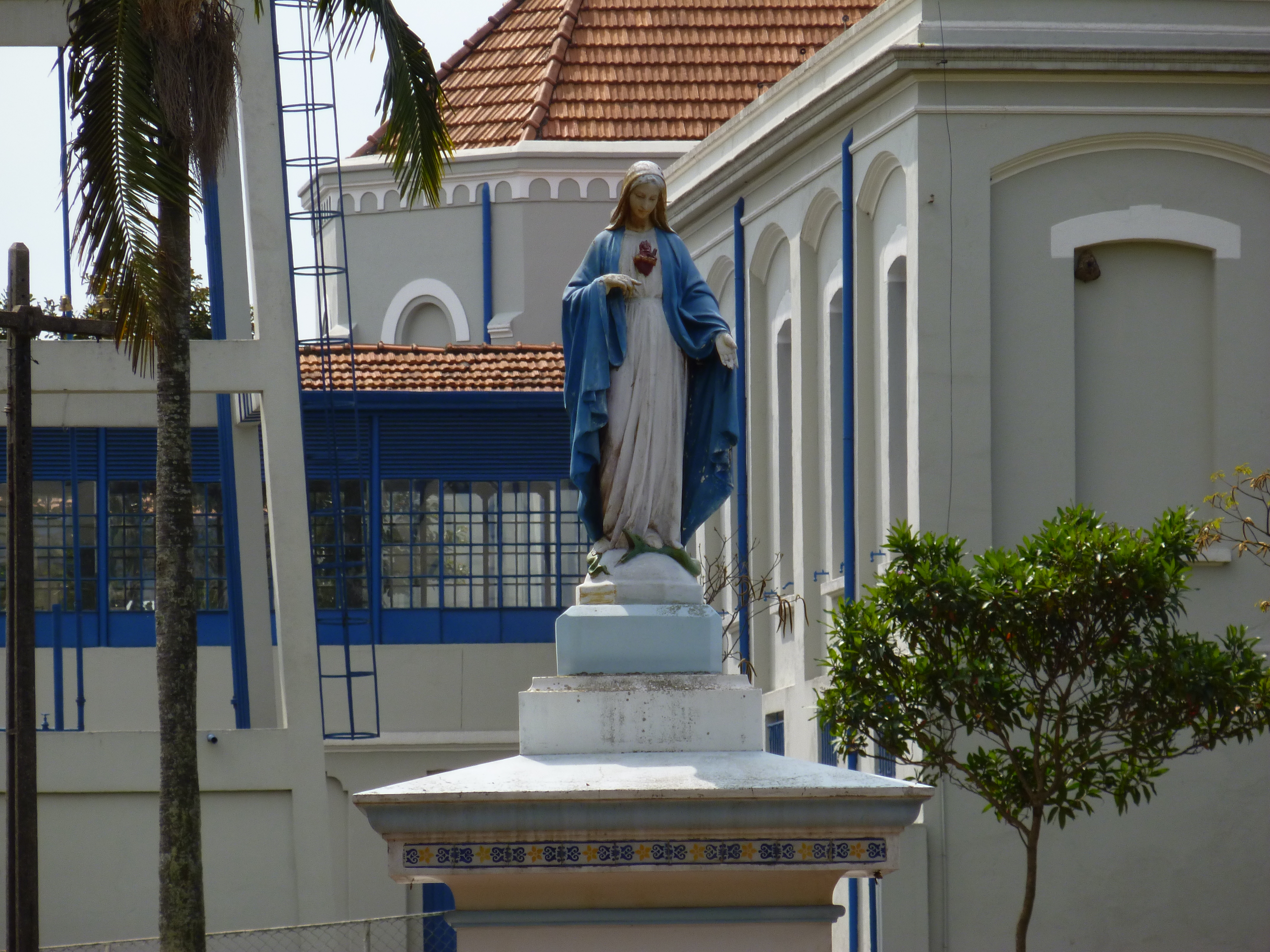 Estátua de Nossa Senhora das Graças, localizada em frente ao edifício principal da Unidade.